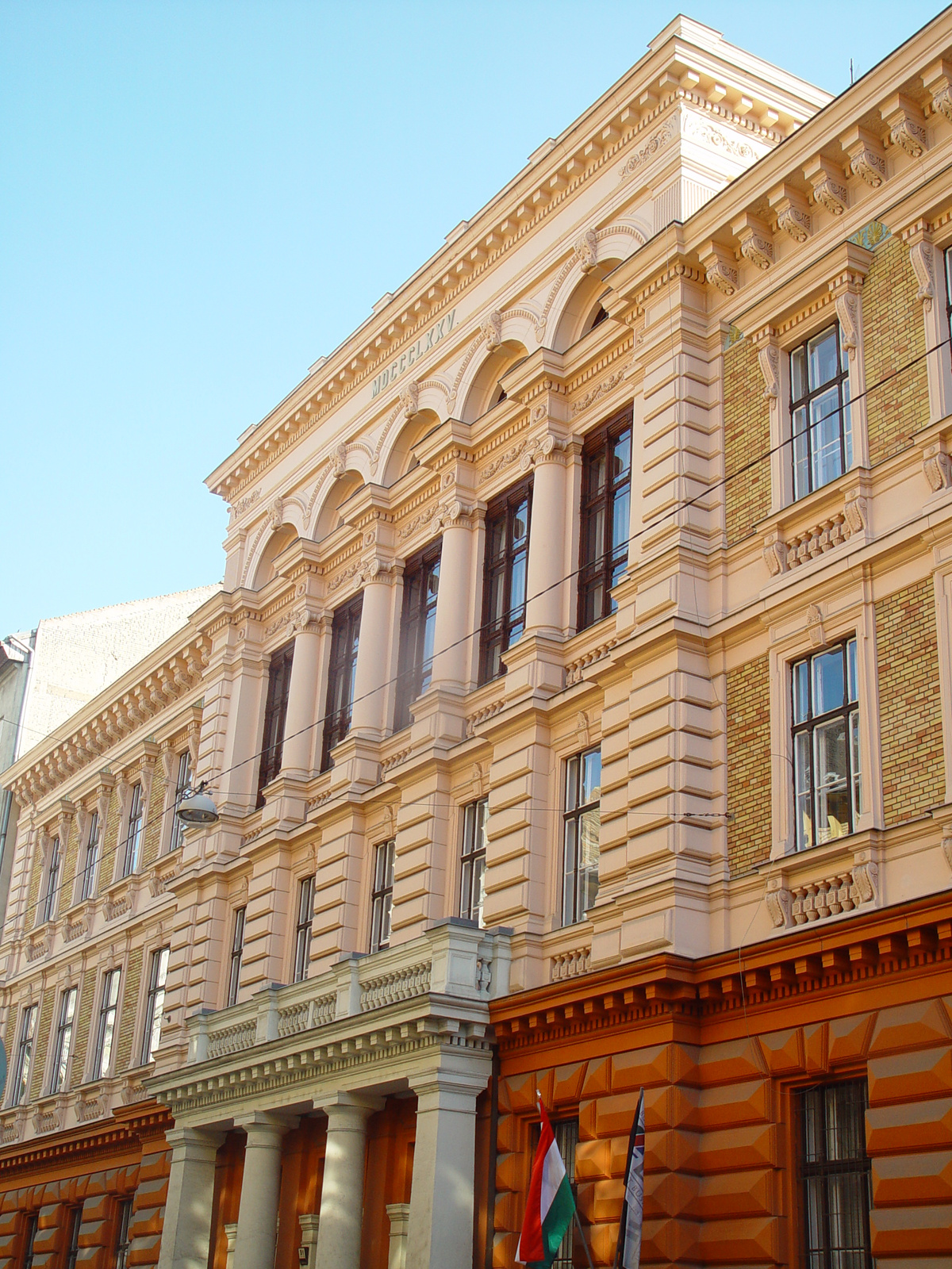 Iskolaépület (Budapest 5, V. kerület Markó Károly utca 29-31., V. kerület Bihari János utca 7.College of Commerce, Catering and Tourism, Budapest. Part of Budapest Business School) This is a photo of a monument in Hungary, Identifier: 527